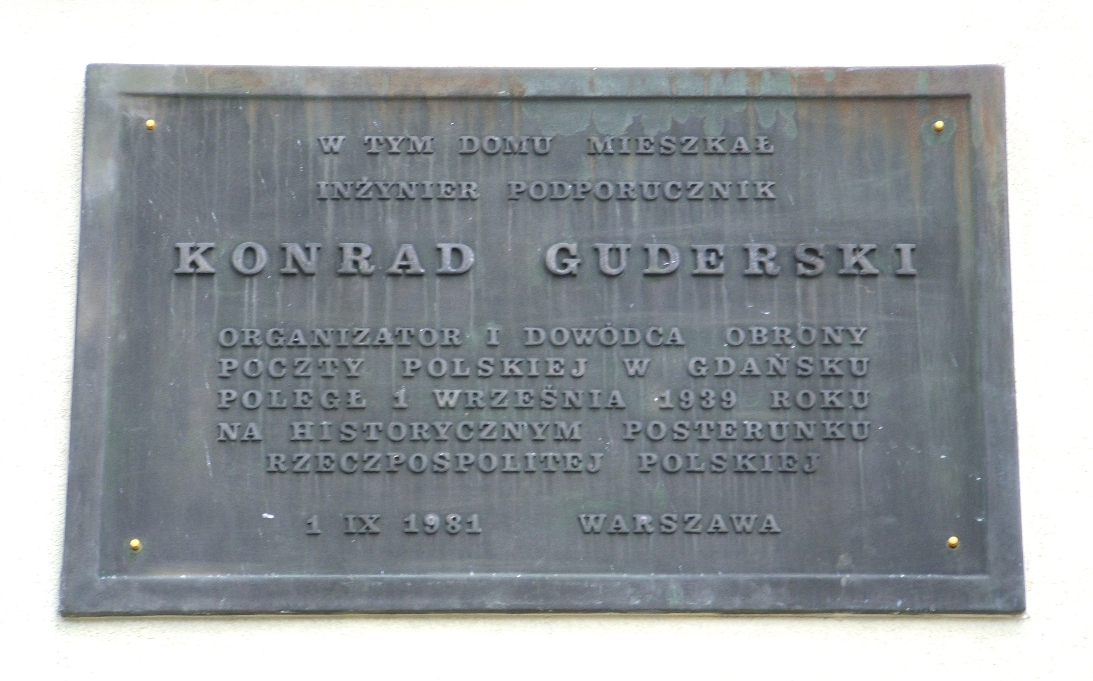 Tablica upamiętniająca Konrada Guderskiego. Warszawa, Saska Kępa, ul. Saska 68.